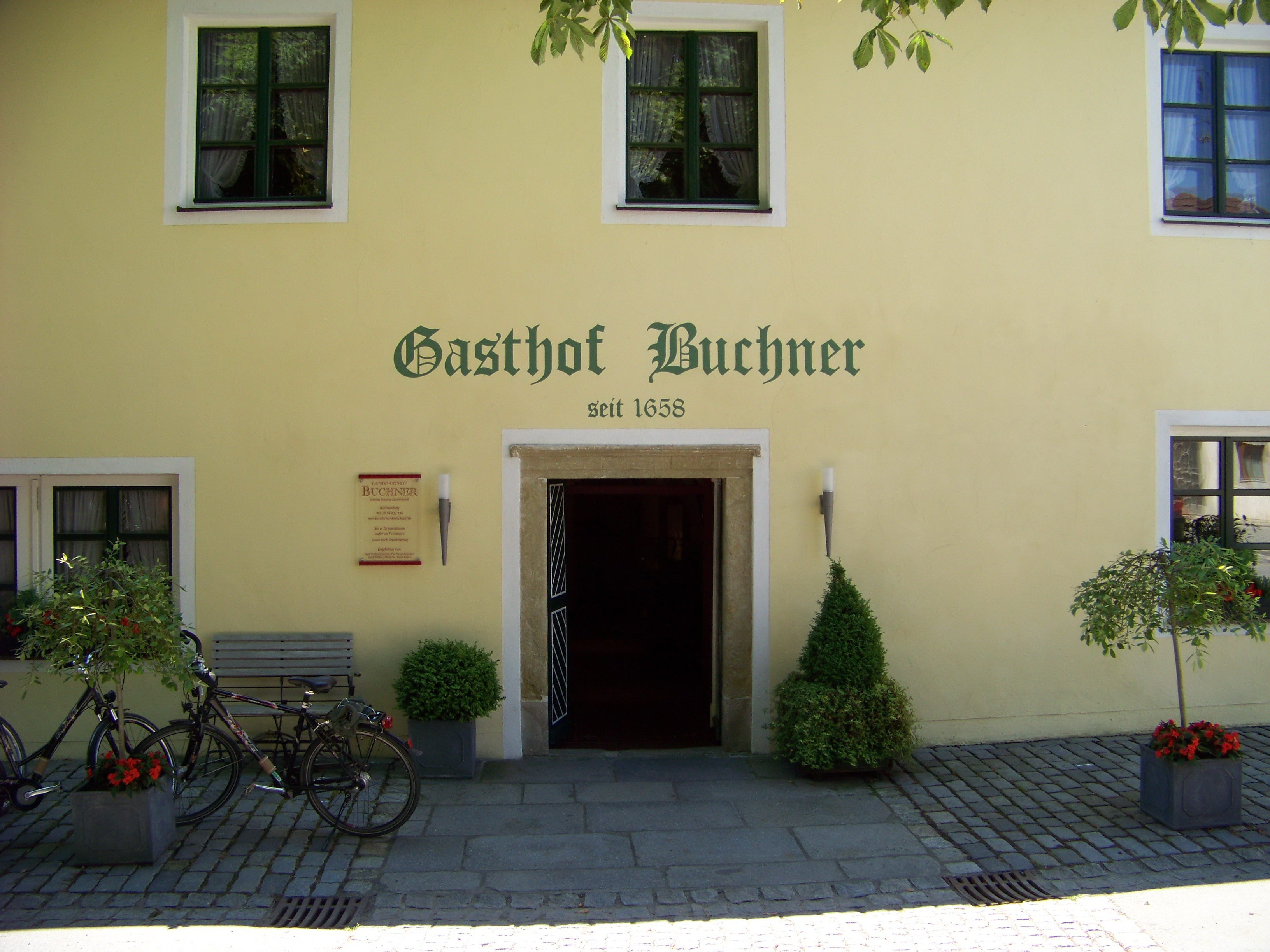 Niederwinkling, Welchenberg, Freymannstraße 12. Gasthaus, ehem. Hoftaverne, stattlicher Bau mit Steilsatteldach und Hausgang mit Kreuzgewölbe, 2. Hälfte 17. Jahrhundert.